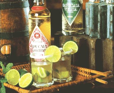 caipirinha e garrafas de cachaça